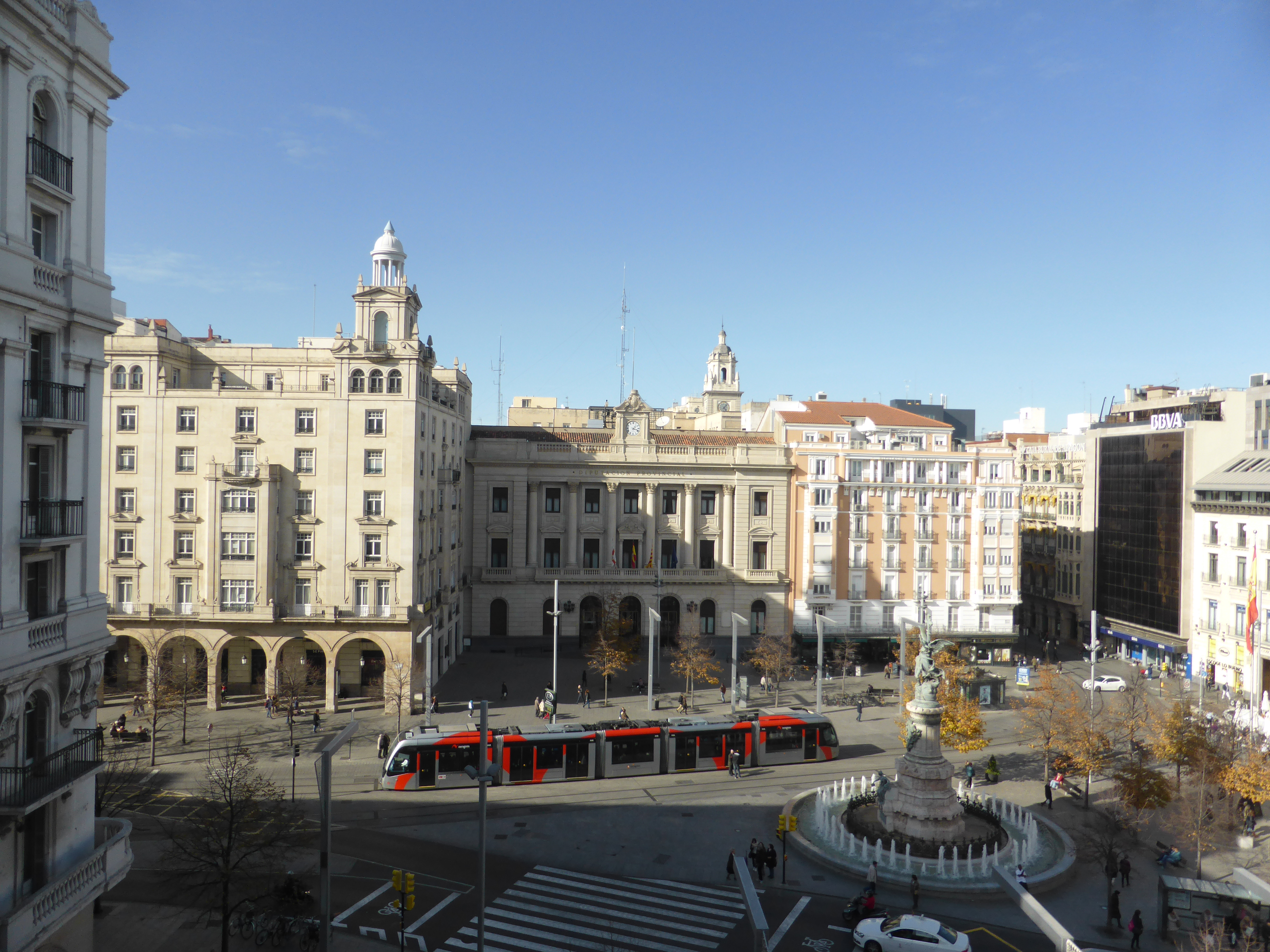 La Plaza de España, vista desde un 5º piso (del Nuevo Hotel Maza). Al frente, la sede de la Diputación Provincial de Zaragoza, y el paso de un tranvía articulado fabricado por CAF. También vemos el Monumento a los mártires, abajo, a la derecha.